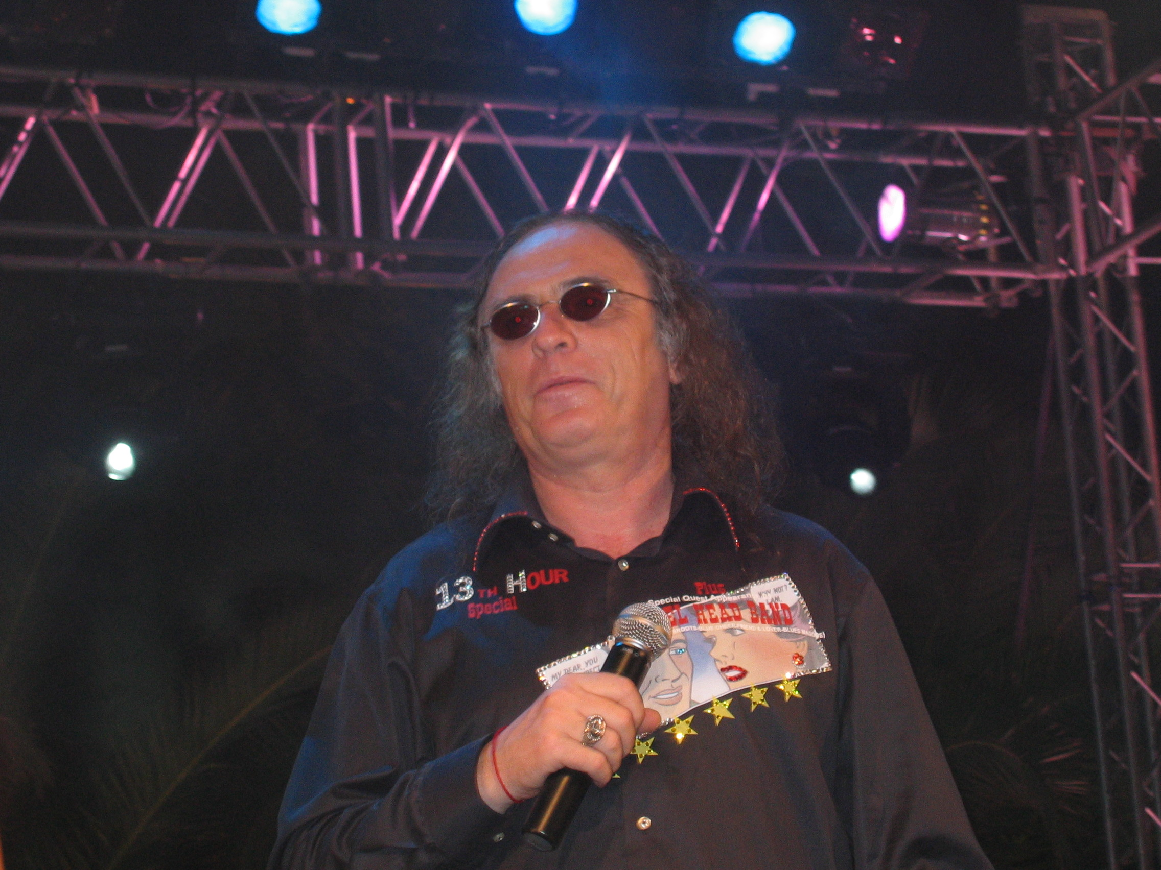 צביקה פיק